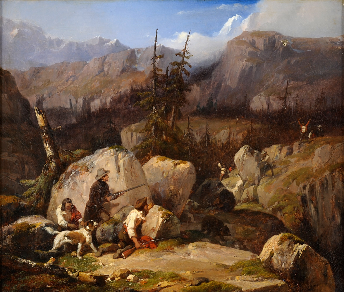 Bärenjagd. Undeutlich signiert 19. Jhdt. Öl auf Leinwand, 46 x 55 cm